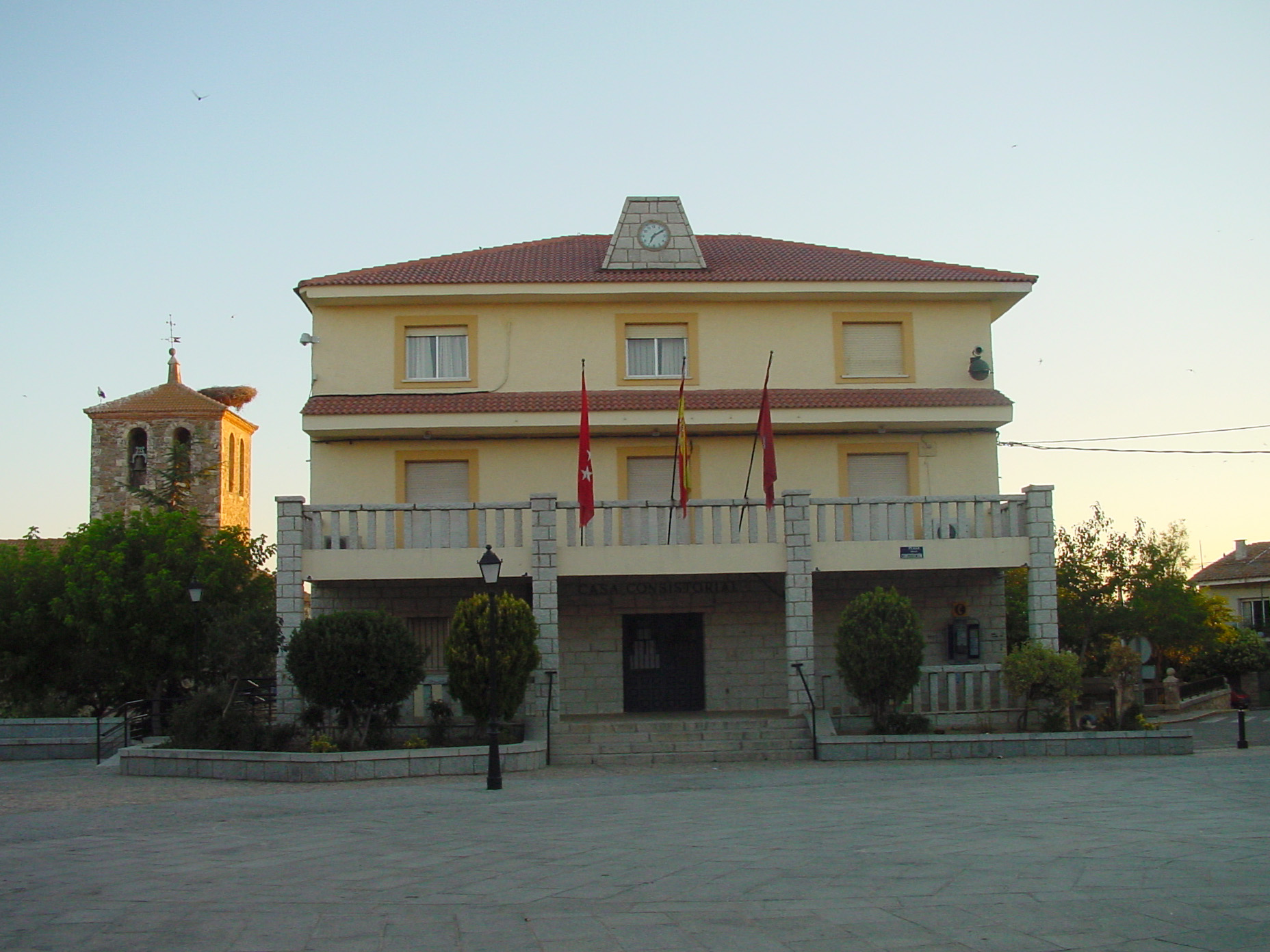 Ayuntamiento de Pedrezuela.